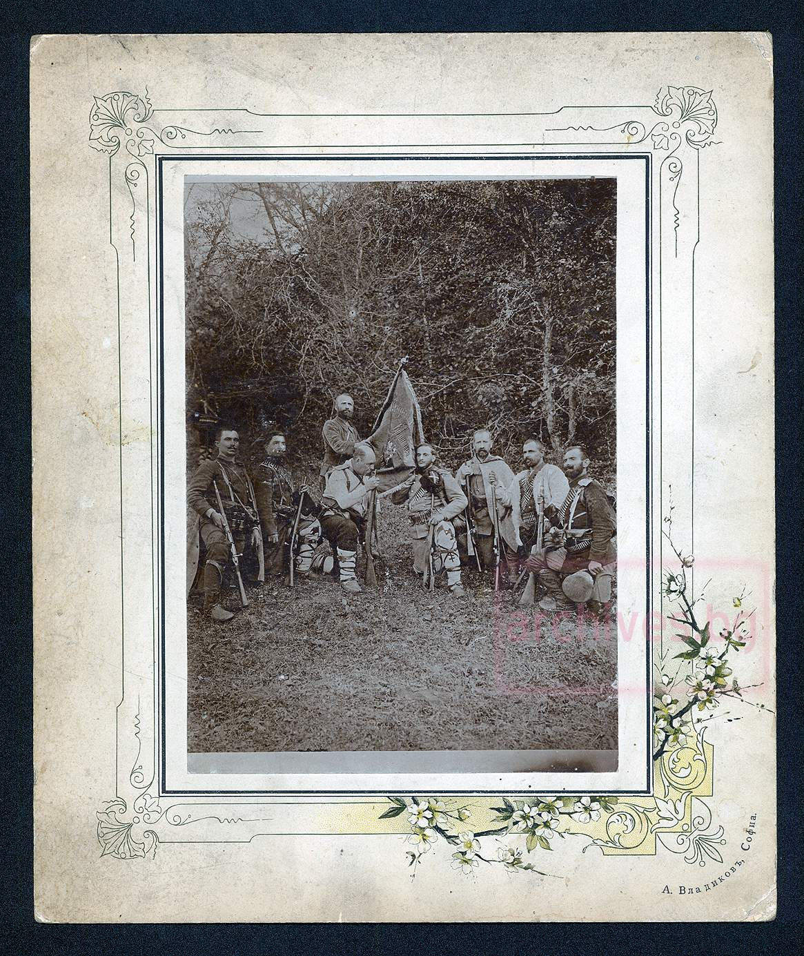 Заклеване на Артър Хейлс и Борис Тагеев в четата на генерал Иван Цончев.